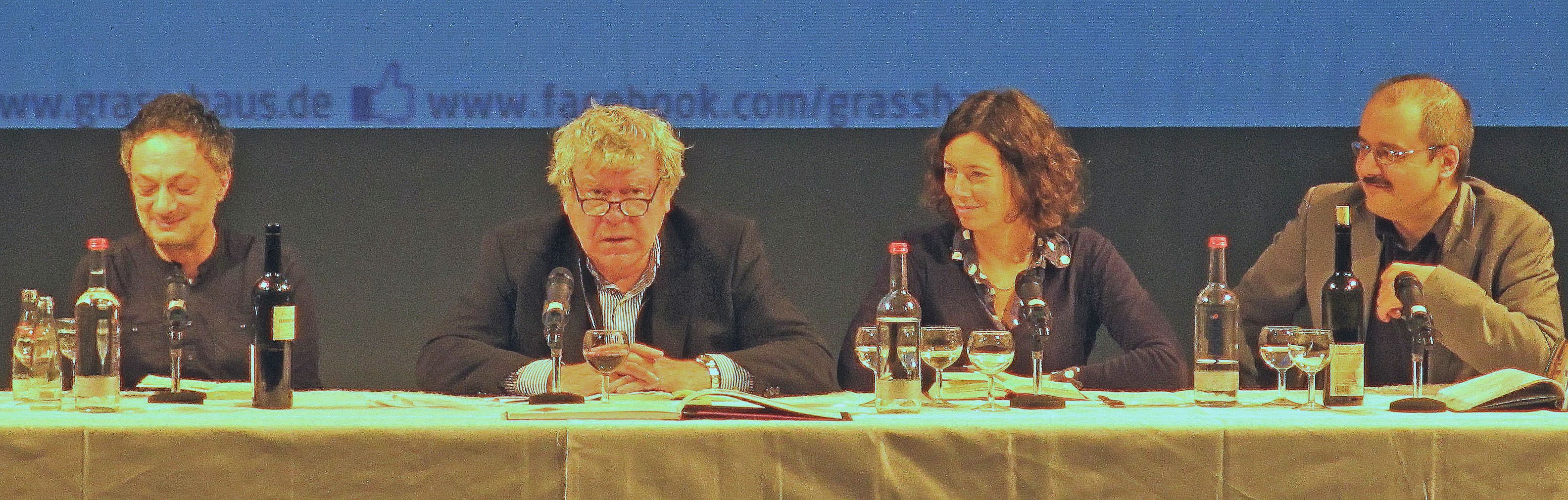 Lübecker Literaturtreffen 2013, Lesung in den Kammerspielen des Lübecker Theaters am 26. Januar 2013; von links: Feridun Zaimoglu, Tilman Spengler, Eva Menasse, Sherko Fatah. Veranstalter war das Günter Grass-Haus, Lübeck